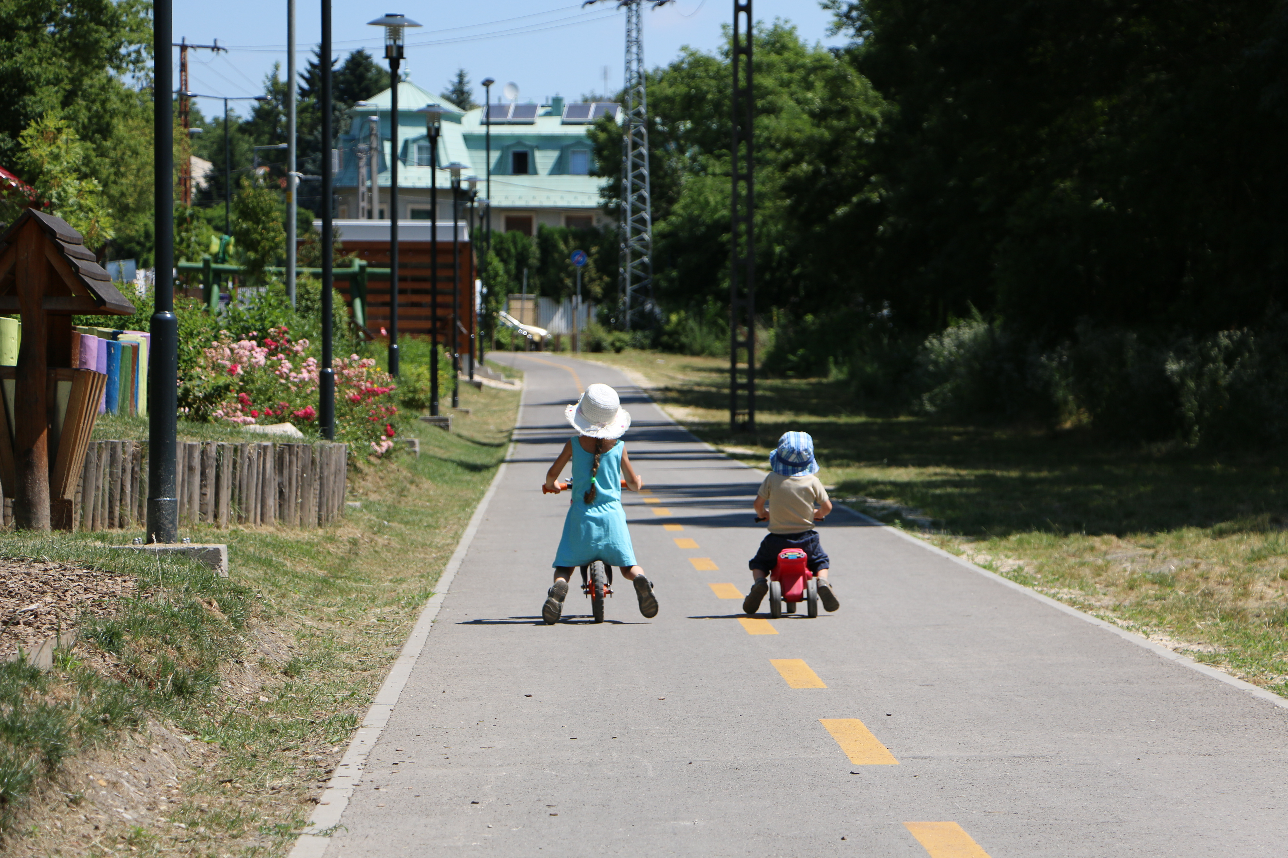 A Szilas-patak menti kerékpárutat a Szlovák úttal összekötő útszakasz a Hermina sportpark mentén.